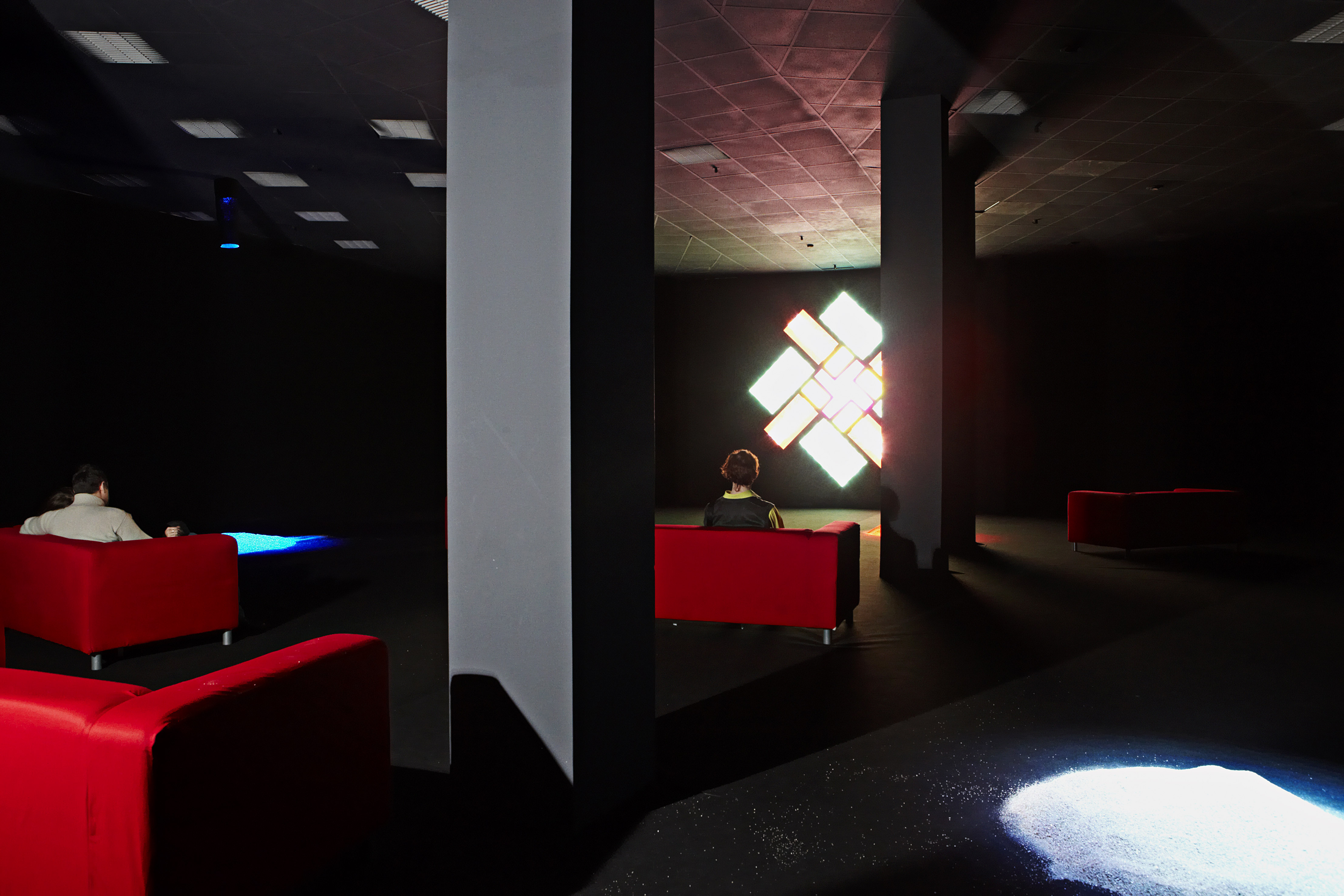 Фестиваль Yota Space 2010 - Brian Eno - инсталляция 77 Mln Paintings